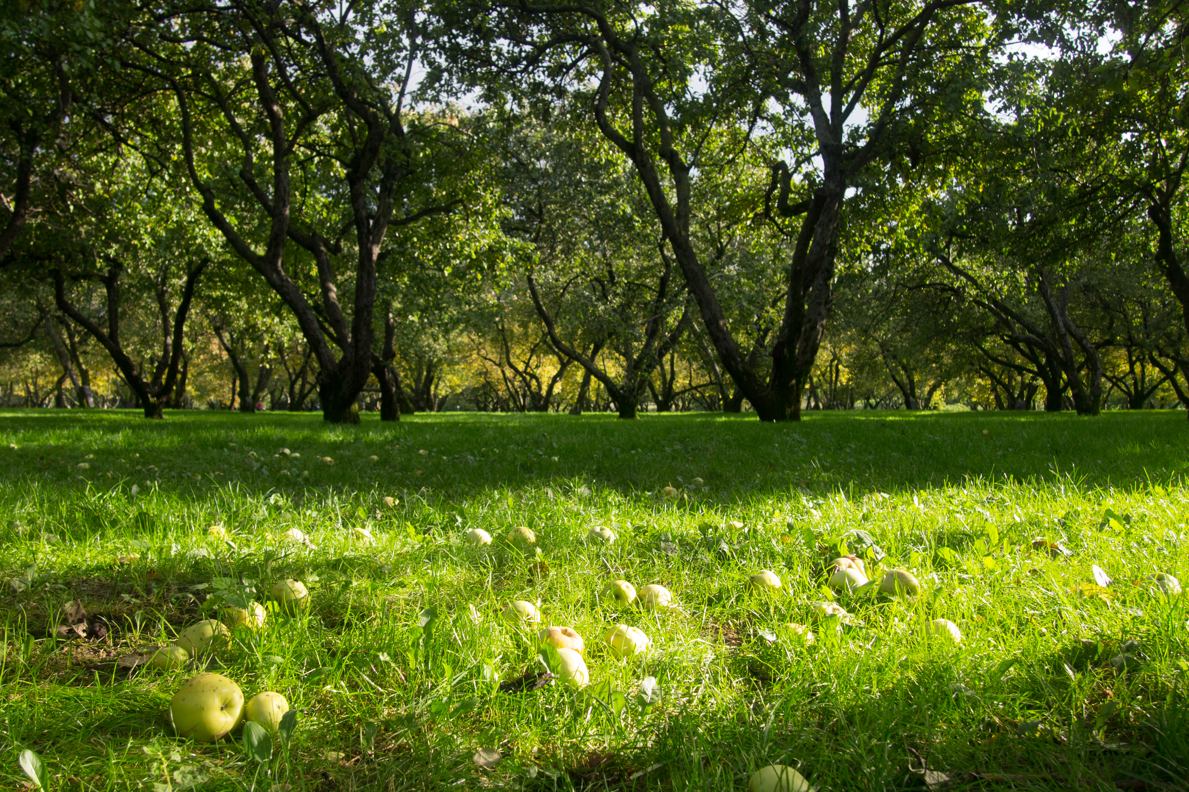 Усадьба «Коломенское» (Москва и Московская область, Москва, Андропова проспект, 31, 39)